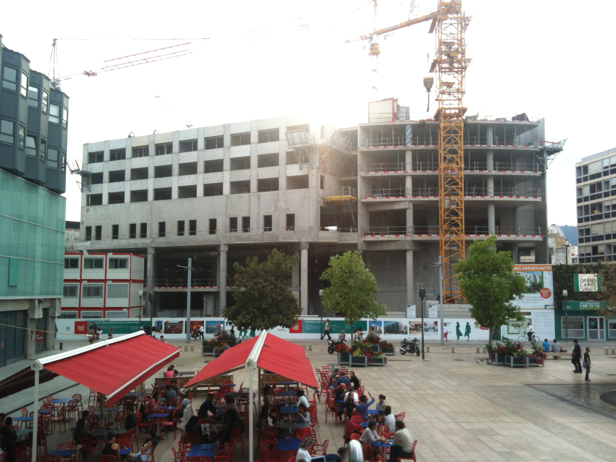 Le Carré Jaude 2 en construction à Clermont-Ferrand (Puy-de-Dôme, France).